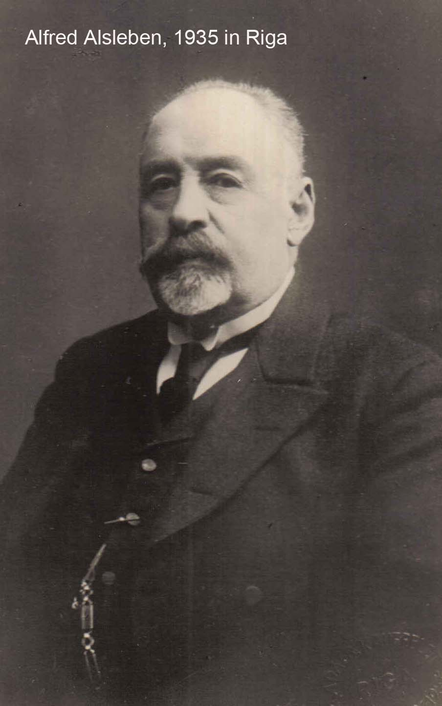 Porträtfotografie von Alfred Woldemar August Alsleben